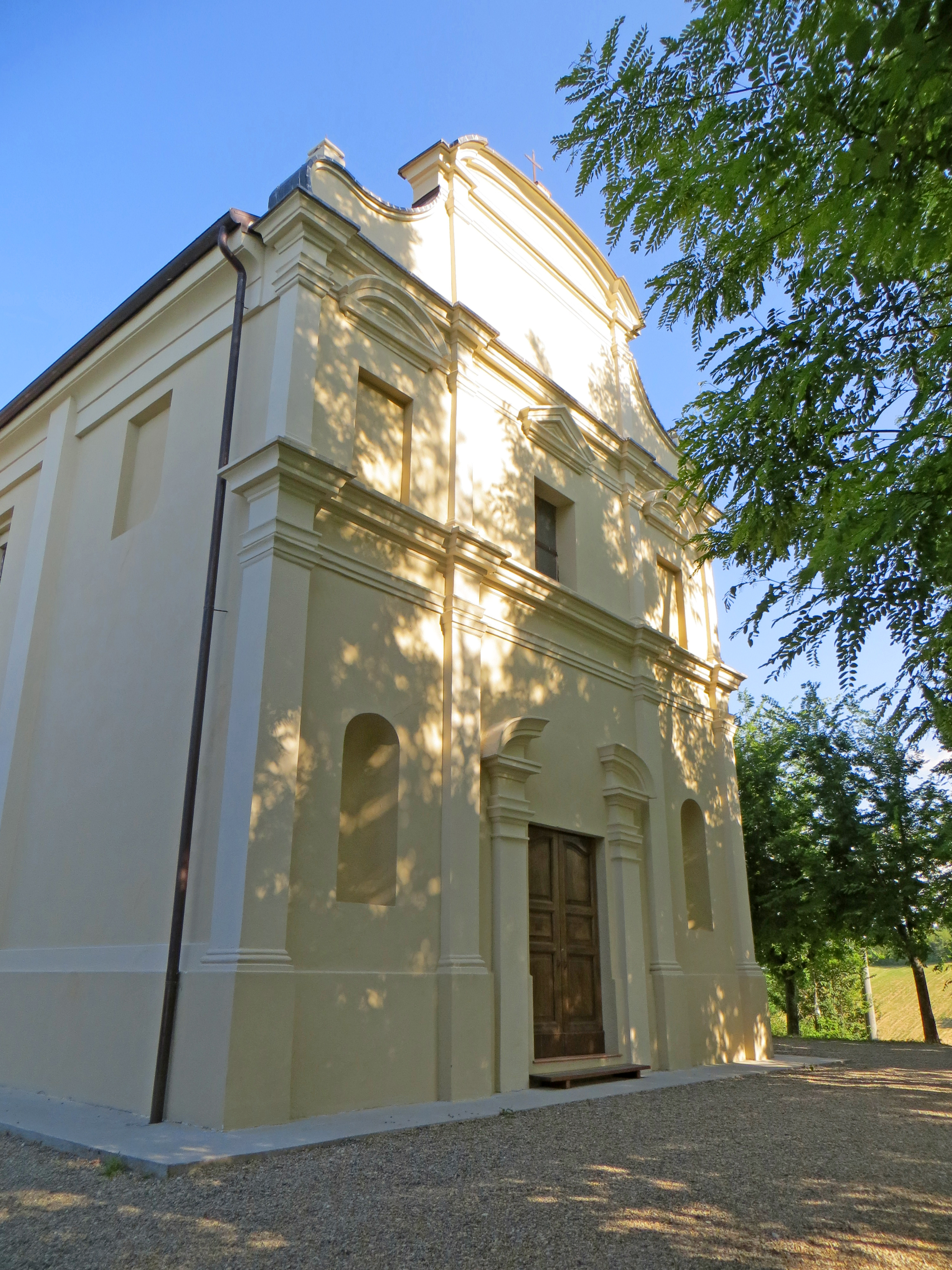 Chiesa di San Lorenzo (Guardasone, Traversetolo) - facciata